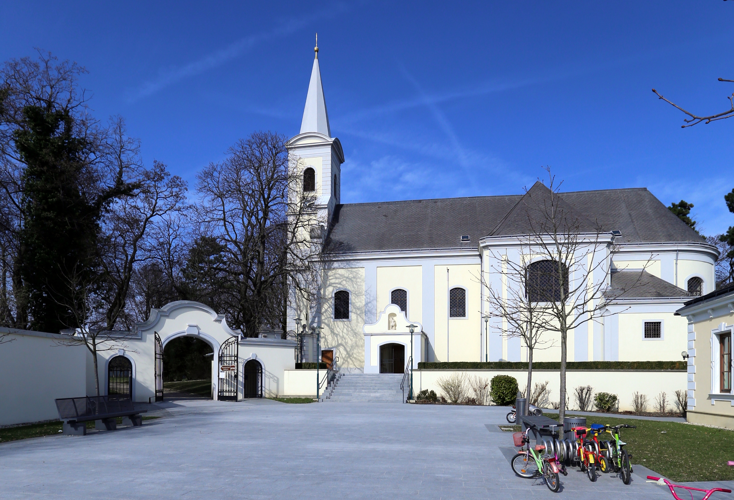 Szent József templom, Féltorony